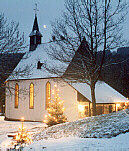 Katholische Kirche St. Maria Magdalena (Magdalenenkapelle), Grotewiese bei Meinerzhagen